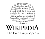 Altes Wikipedia-Logo, in Benutzung ab 27-Nov-2001.